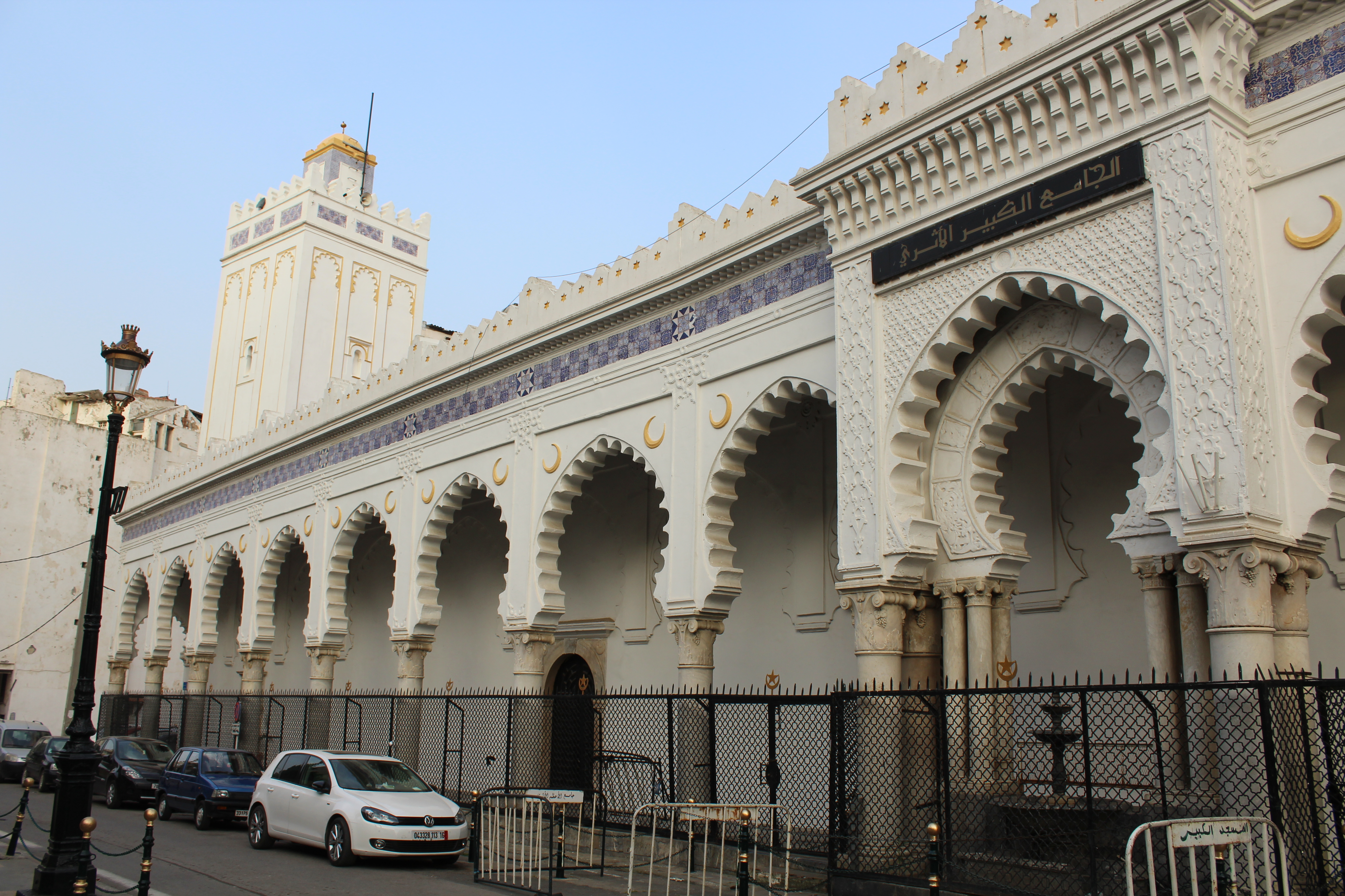 Grande mosquée d'Alger